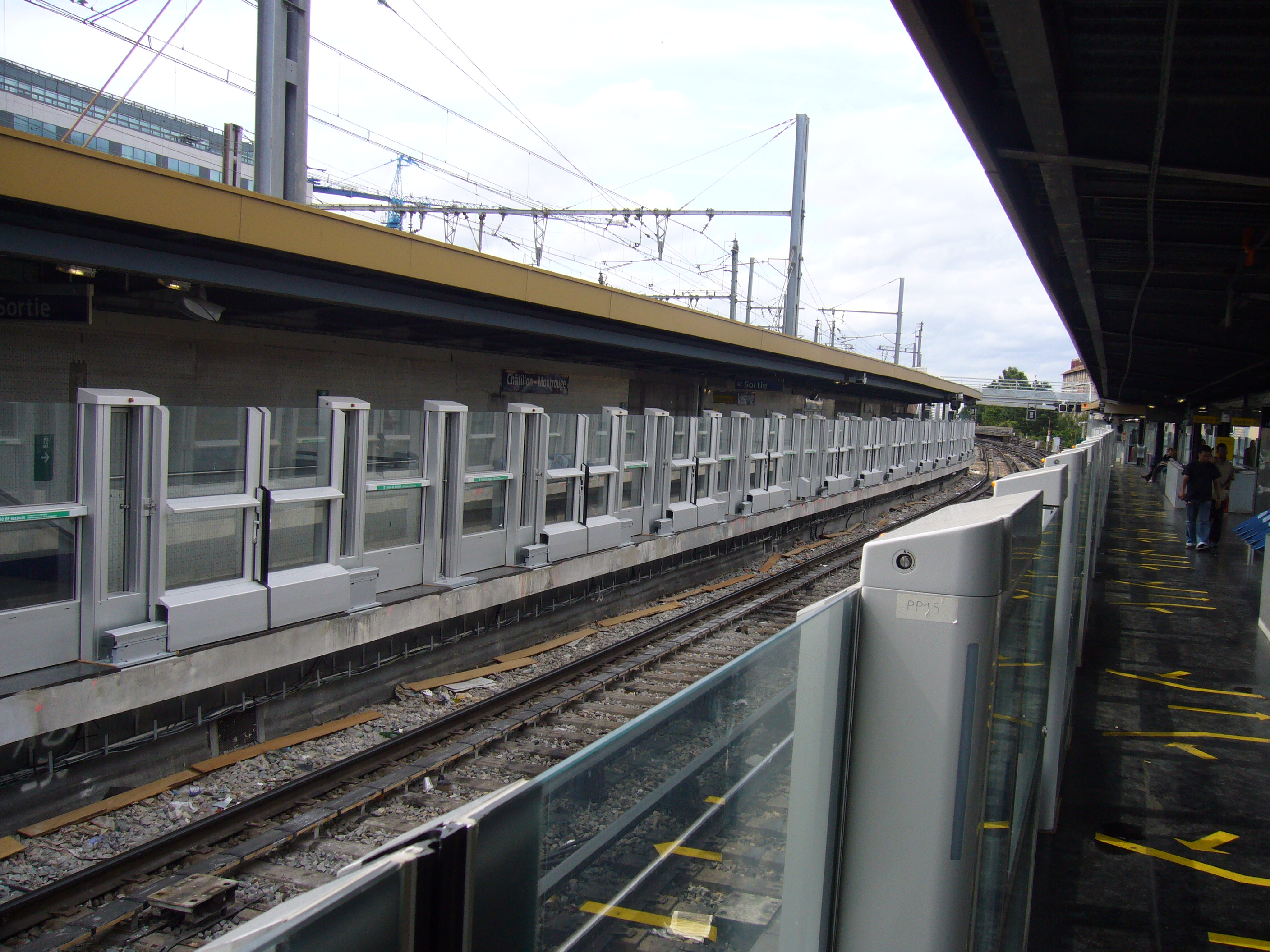 Portes palières protégeant les voies de la station Chatillon Montrouge sur la ligne 13 du Métro de Paris